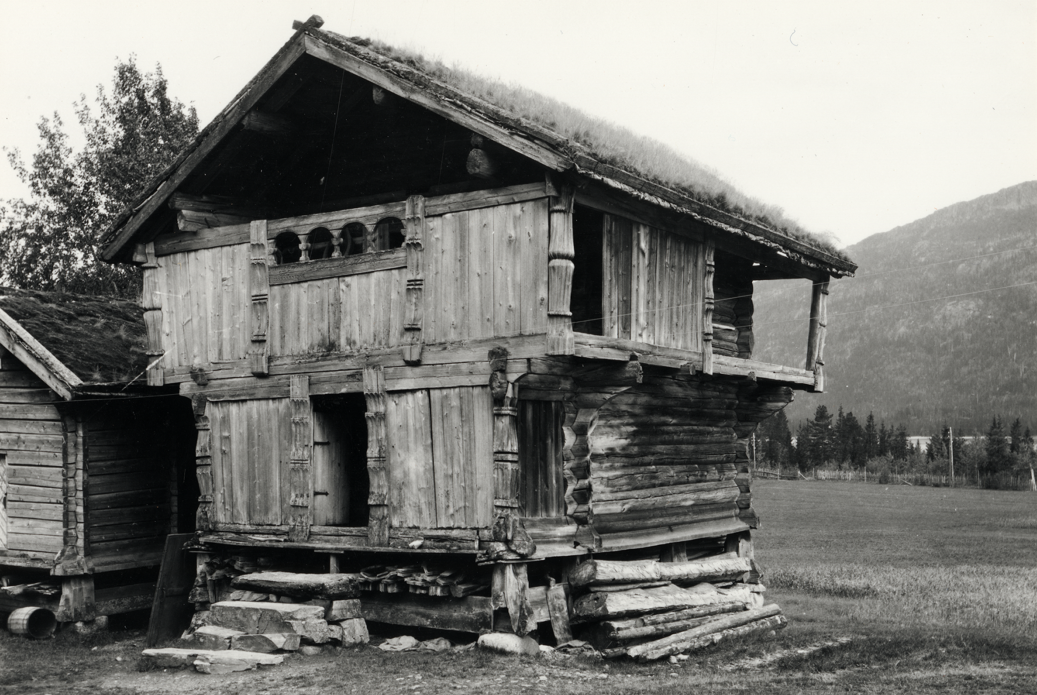 Heggestøyl, Heggjestøyl, Heggstøyl, Heggestøl i Vinje, Telemark